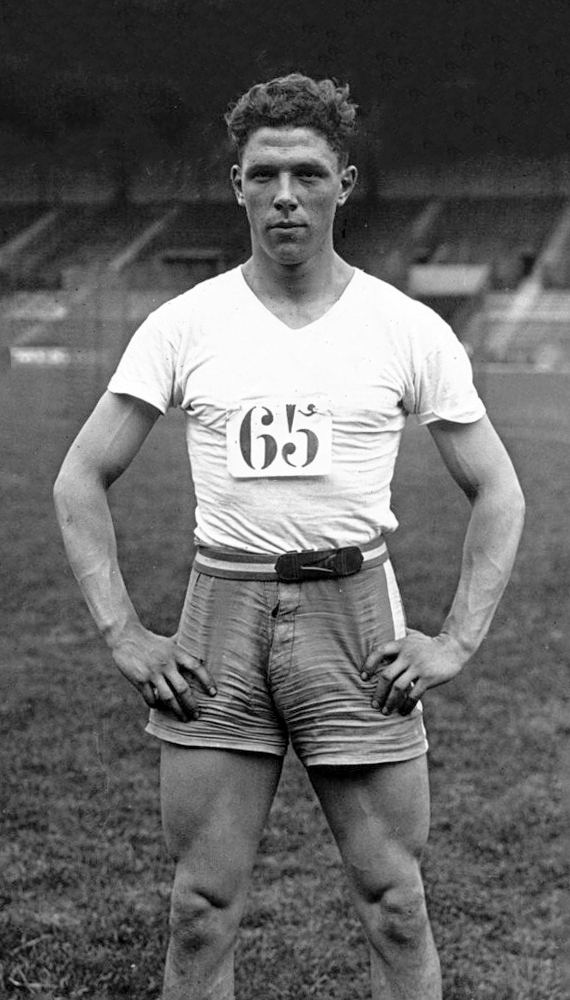 Colombes, championnat de Paris d'athlétisme : Flouret (portrait) : [photographie de presse] / Agence Meurisse